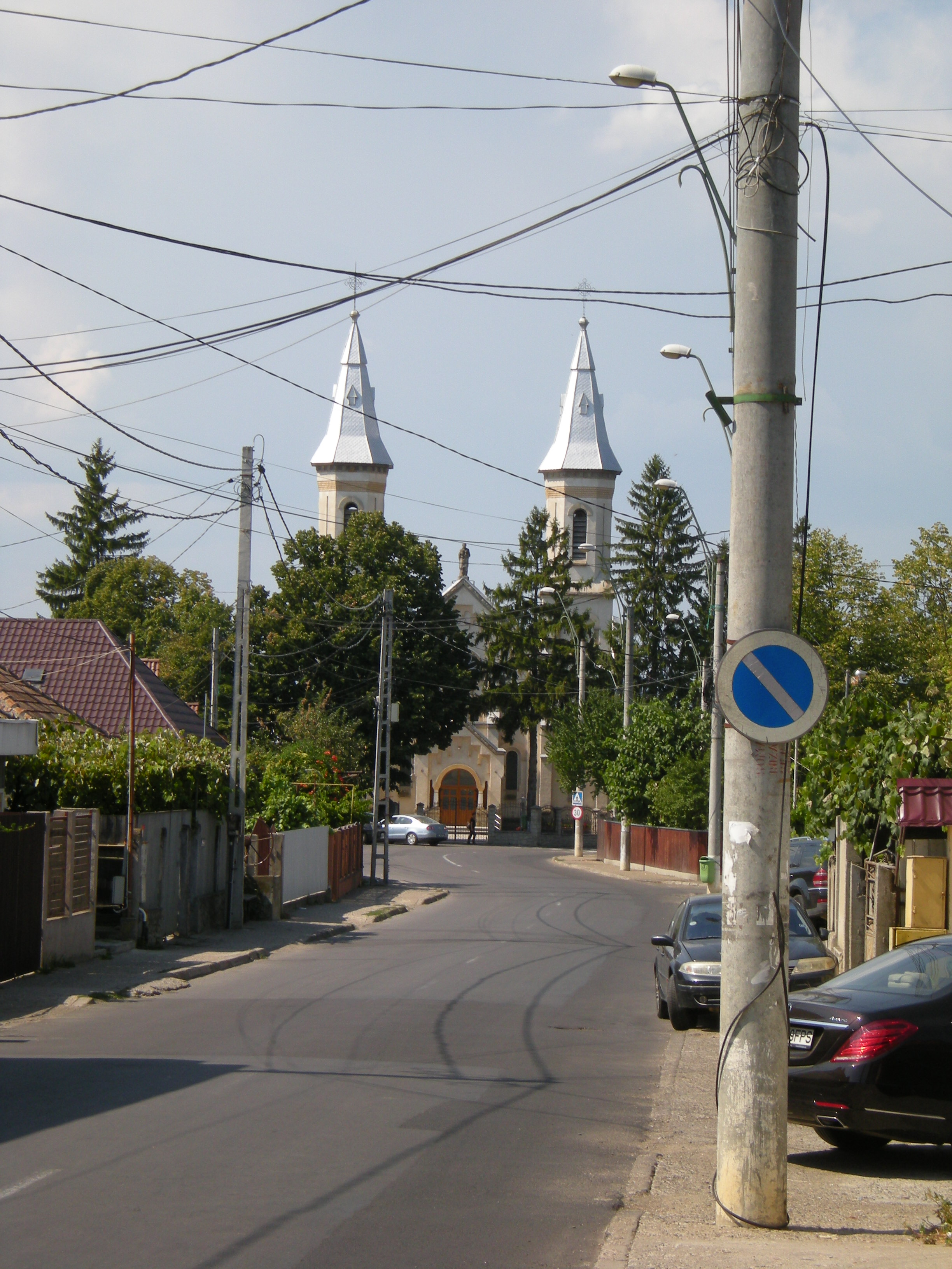 Biserica cu hramul „Sfinții Petru și Paul” din Onești, construită între 1920-1945.